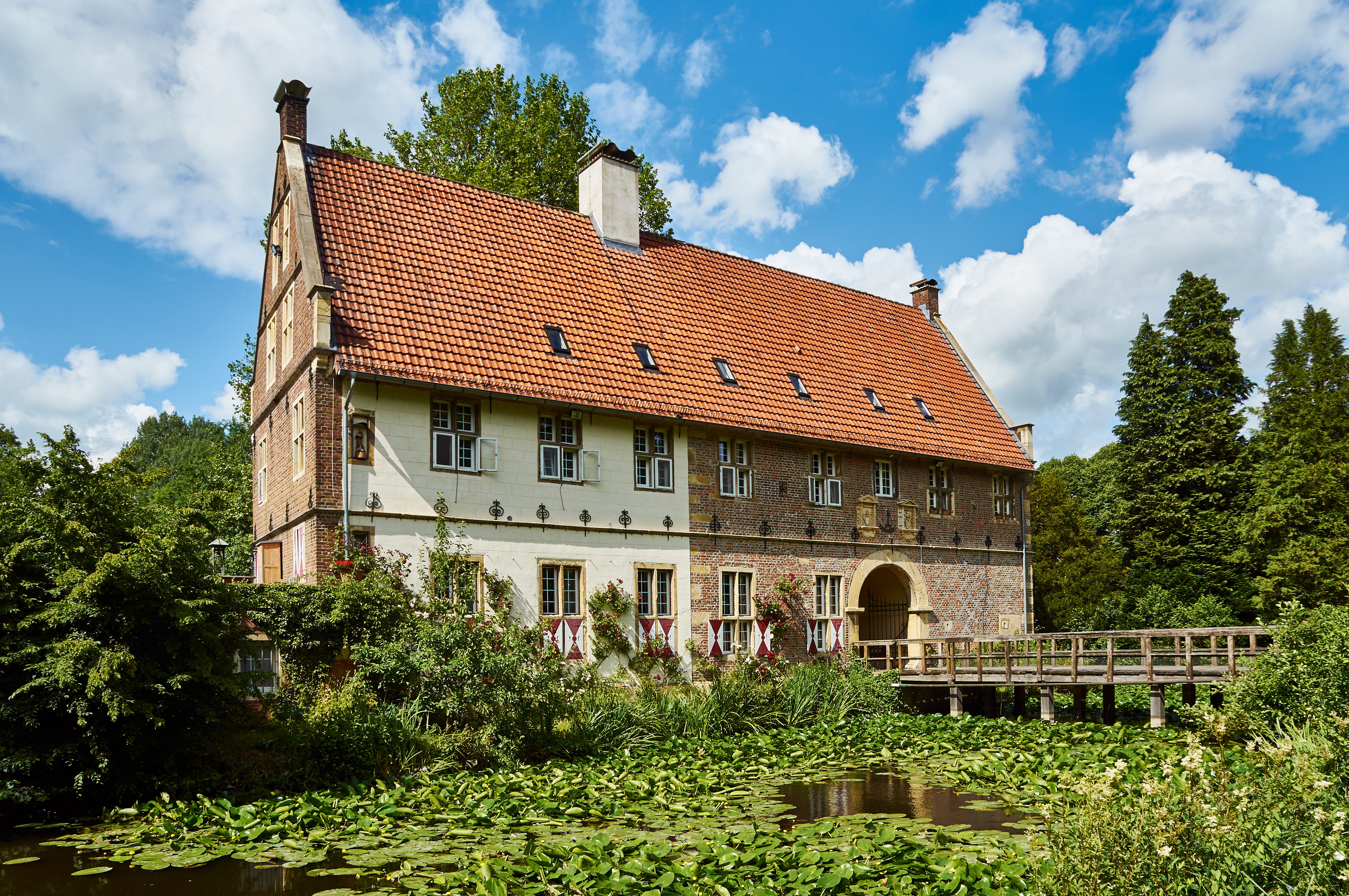 Die Loburg bei Coesfeld ist ein Herrenhaus aus dem 16. Jahrhundert mit Gräftenanlage. This is a photograph of an architectural monument.